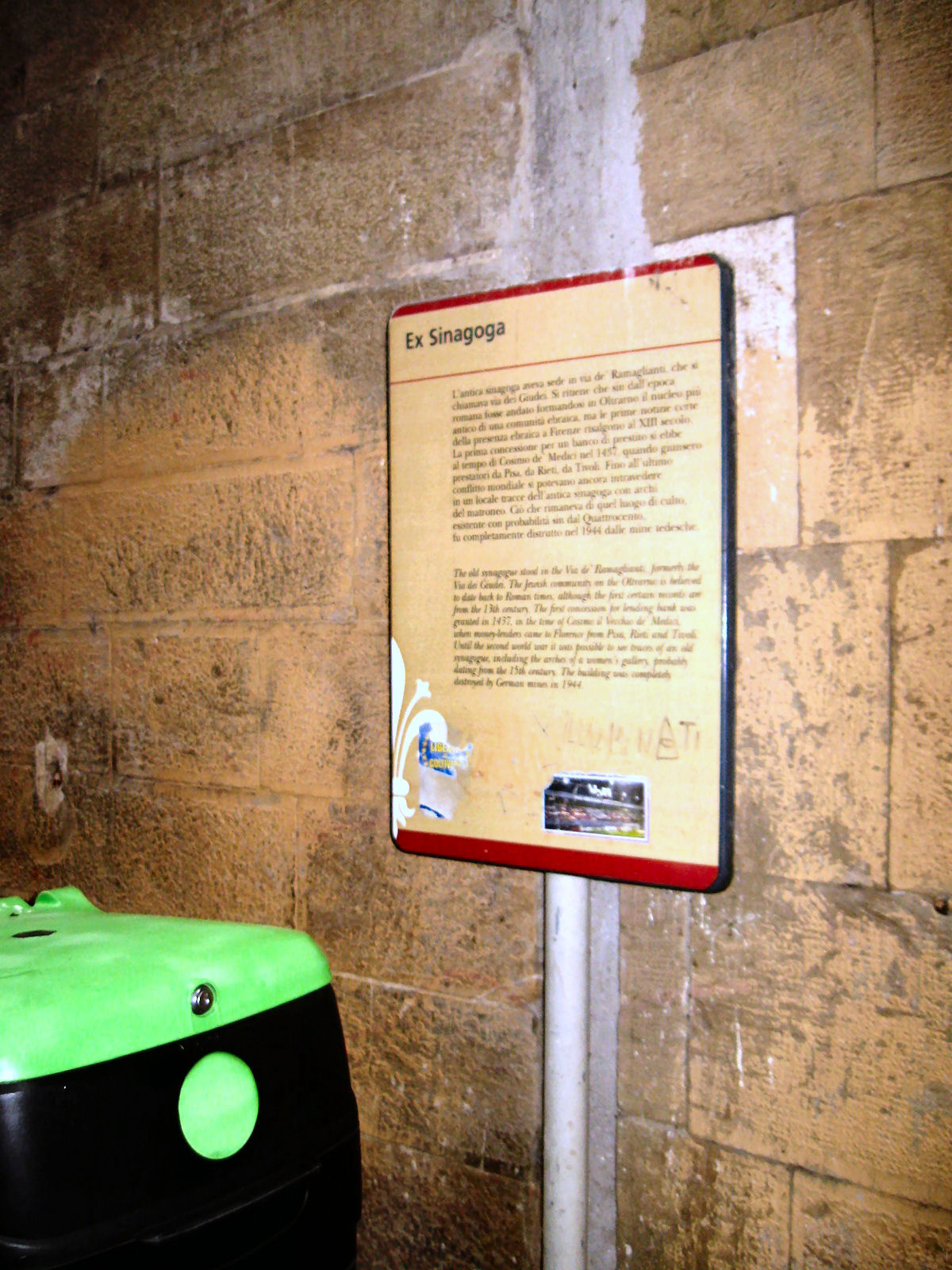 שלט המציין קיום בית כנסת לשעבר רישיון נוצר על ידי משתמש:Daniel Ventura